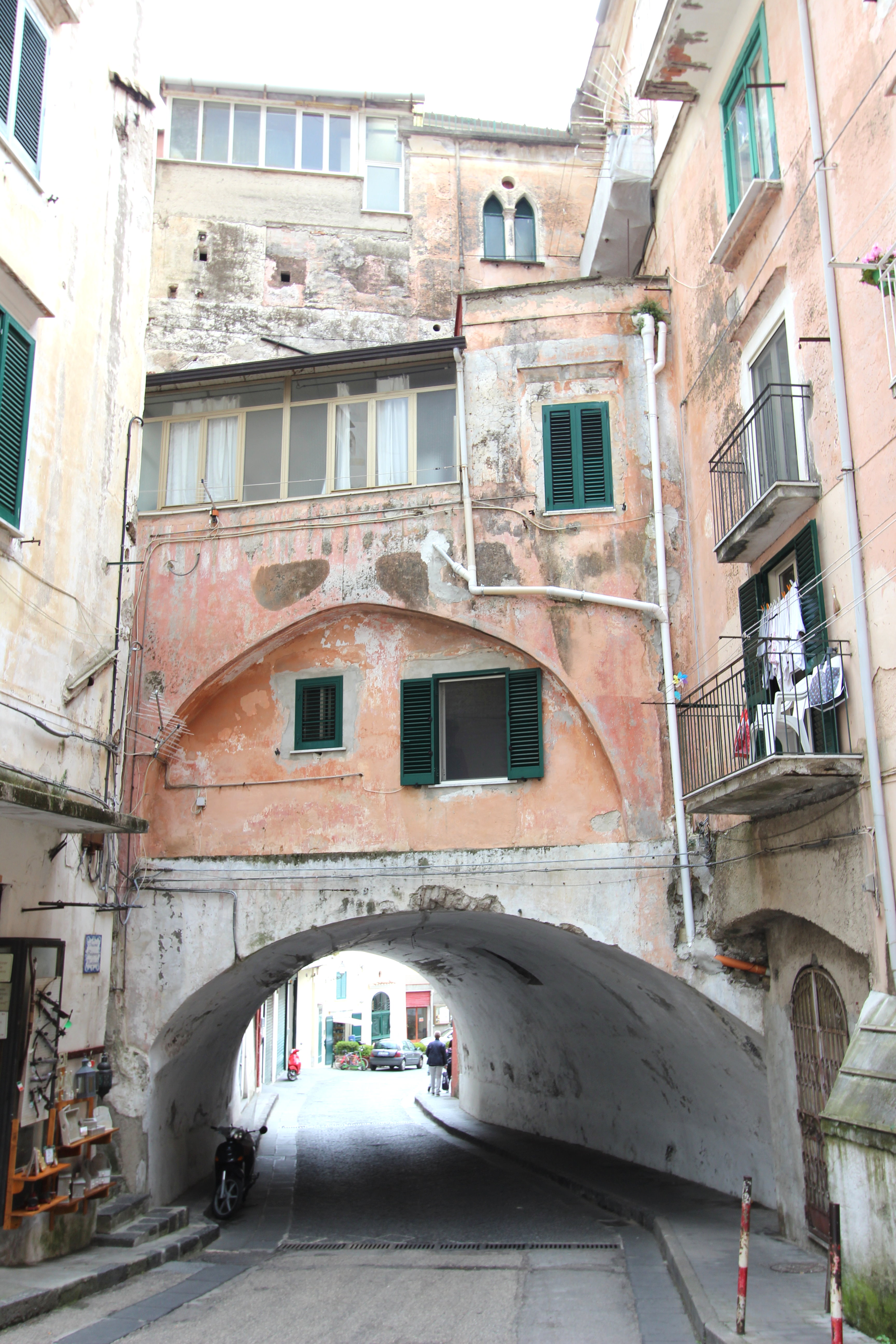 Straßenunterführung in 84011 Amalfi SA (Italien), Via Cardinale Marino del Giudice 10. Aufnahme von 2017.